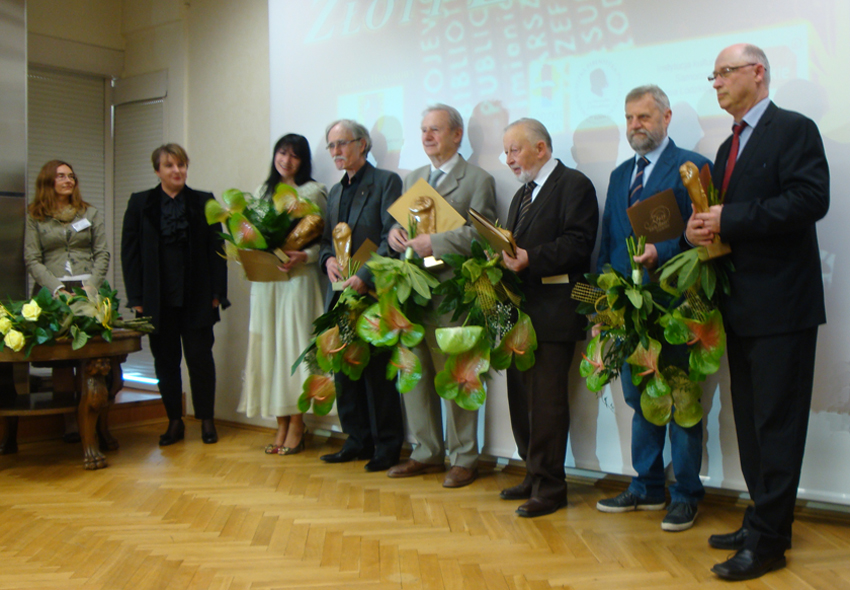 Laureaci Złotych Ekslibrisów Wojewódzkiej Biblioteki Publicznej w Łodzi za 2013 r.